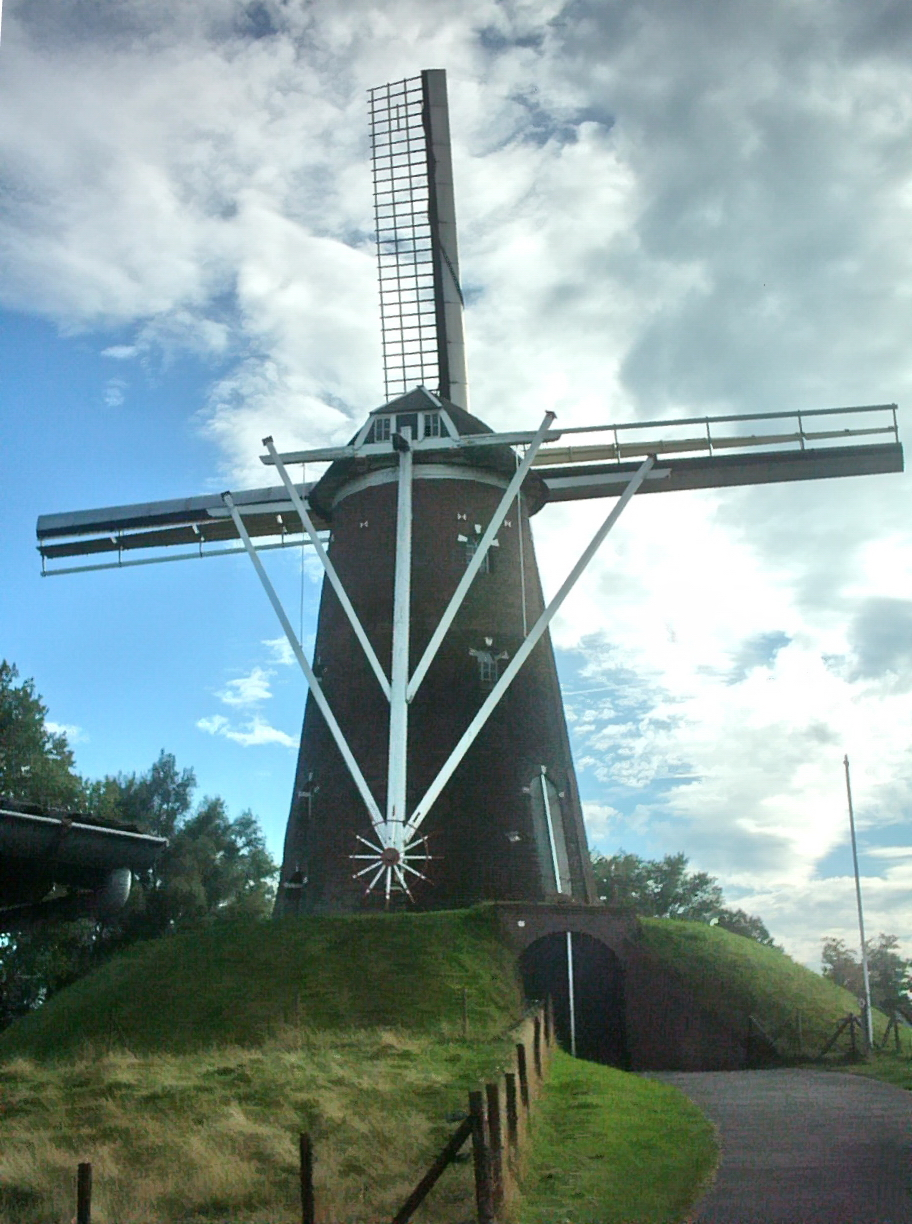 Bredevoort, mill "Prins van Oranje".